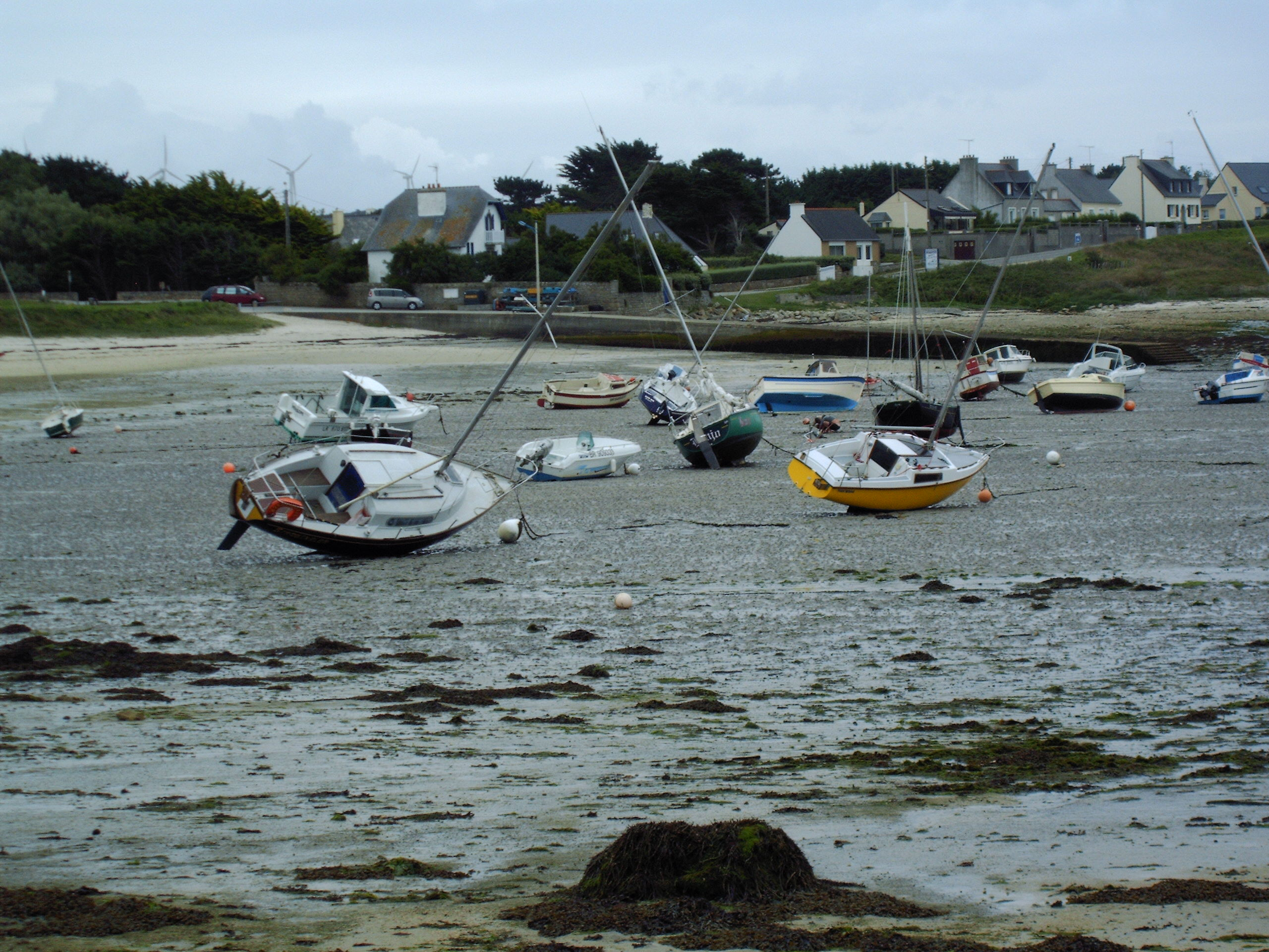 Strobineler à l'échouage dans le port de PorsPaul à LAMPAUL-PLOUARZEL (29 - FINISTERE FRANCE)